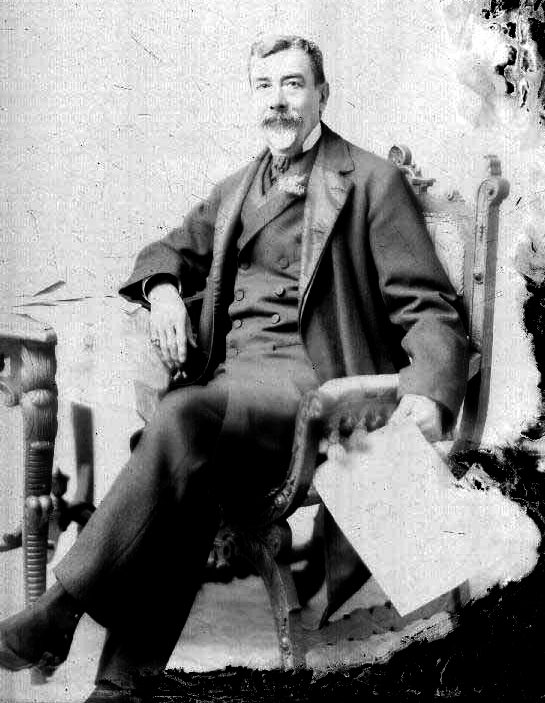 Andrés Avelino Aramburú Sarrio (1845-1916)